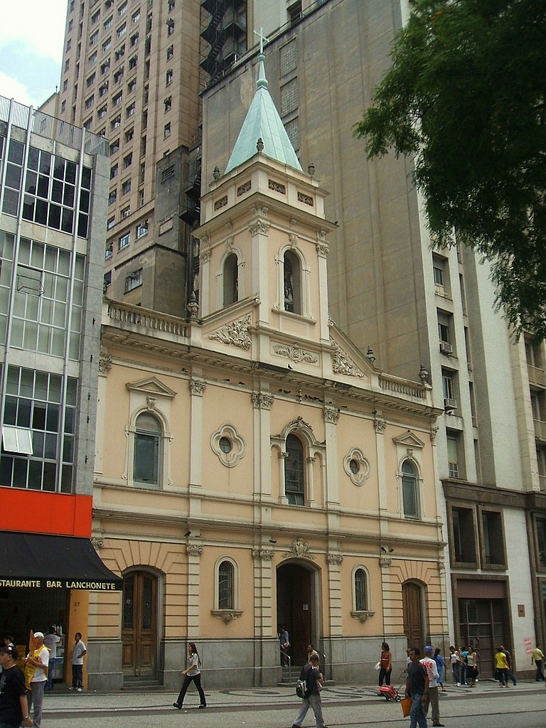 Igreja de Santo Antônio, na Praça do Patriarca (São Paulo, Brasil)